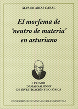 Portada del libro El neutro de materia, de Álvaro Arias